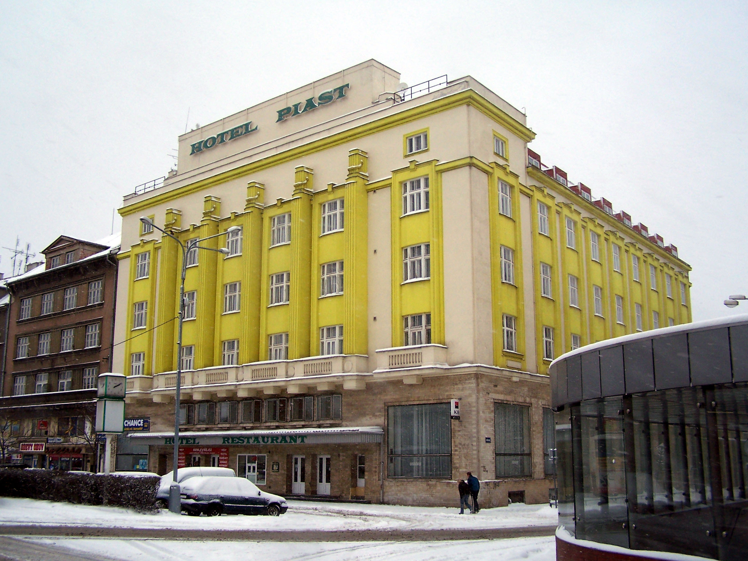 Hotel Piast in Český Těšín (Czeski Cieszyn)